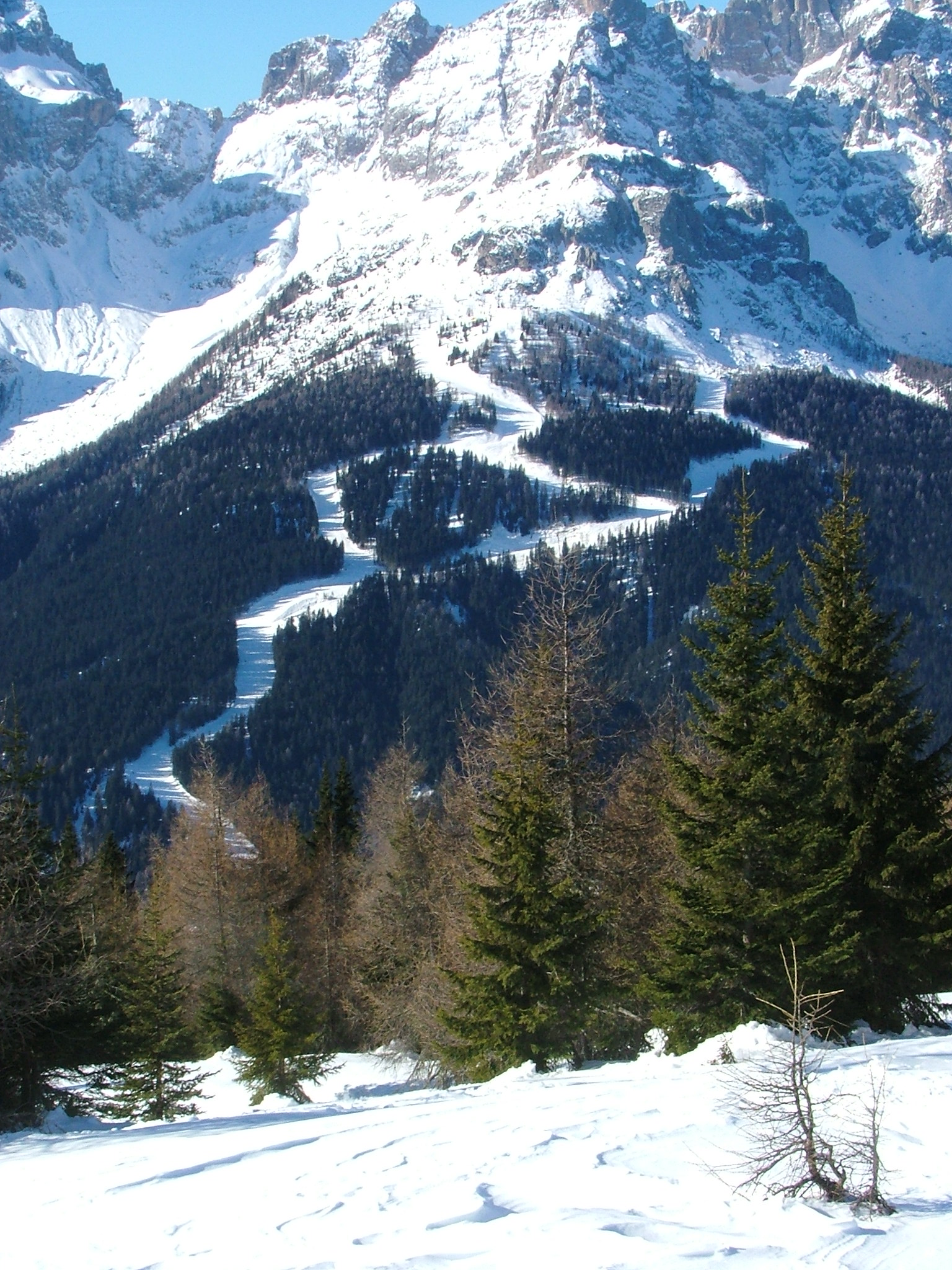 Piste di sci di Padola Comelico Superiore, Belluno, Veneto, Dolomites, Italy